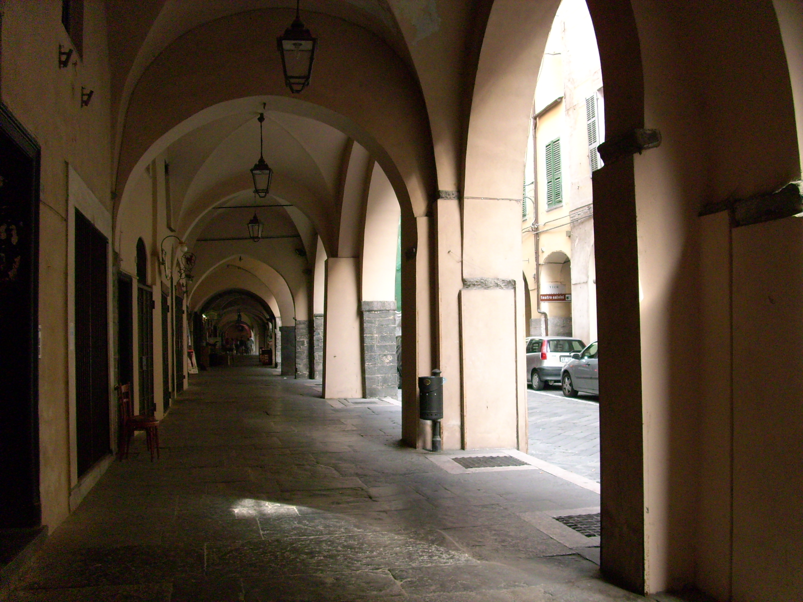 Centro storico di Pieve di Teco, Liguria, Italia